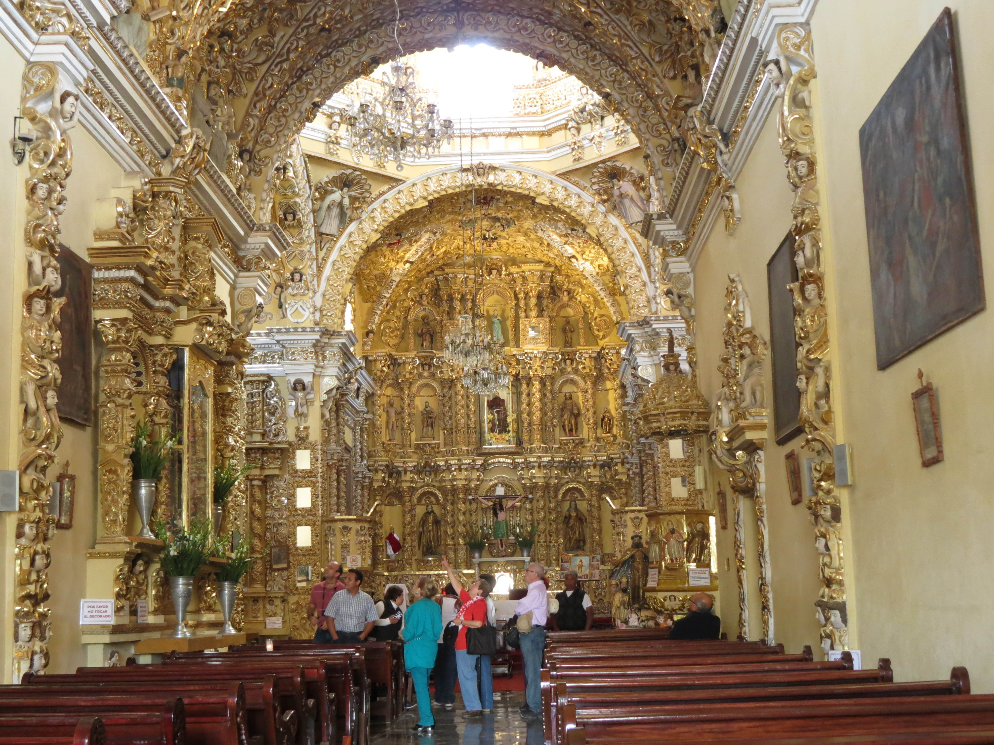 Interior del Templo de San Francisco Acatepec